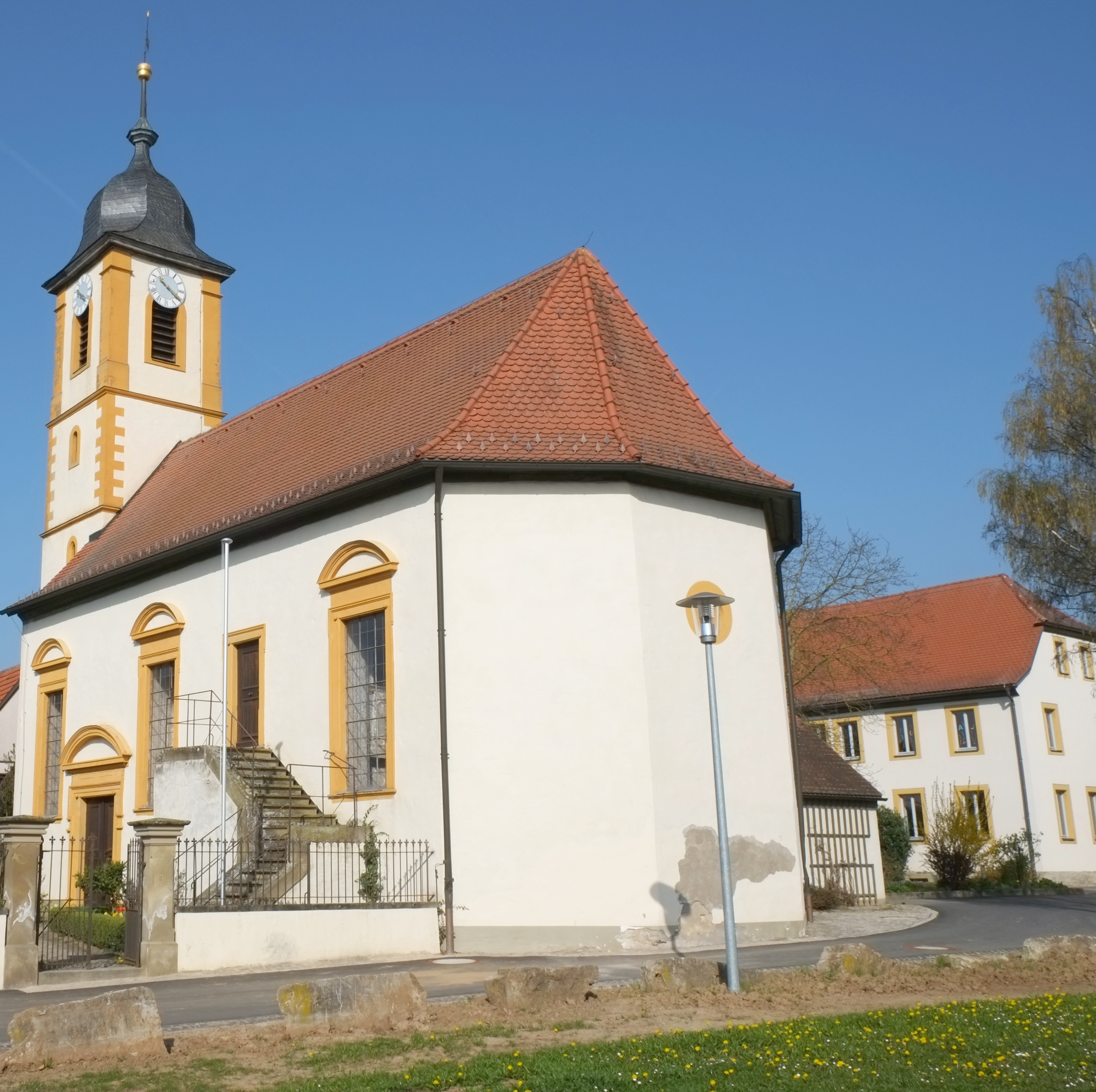 Evangelische Kirche in Giebelstadt im Landkreis Würzburg (Bayern, Deutschland)